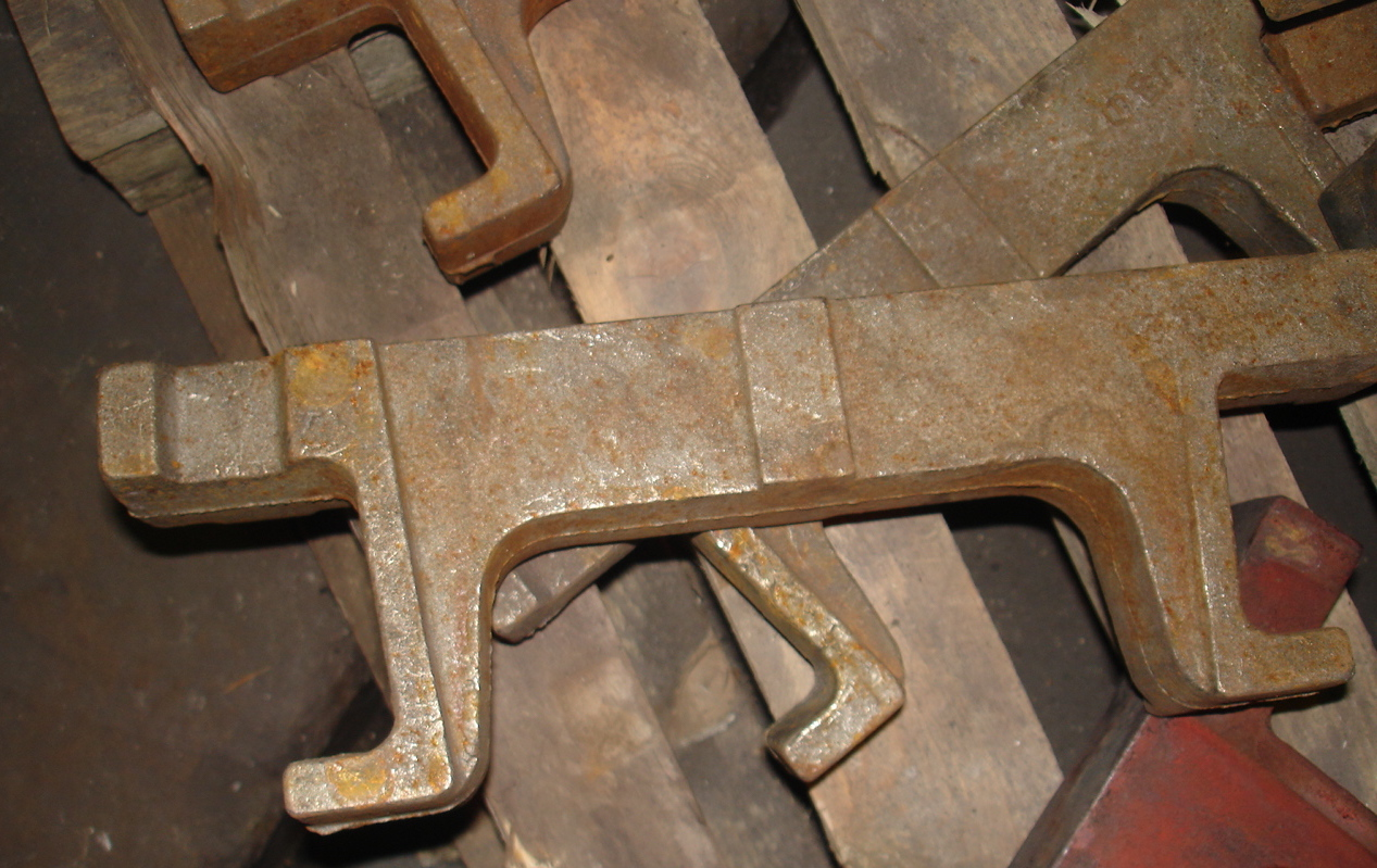 Колосник обжиговой тележки